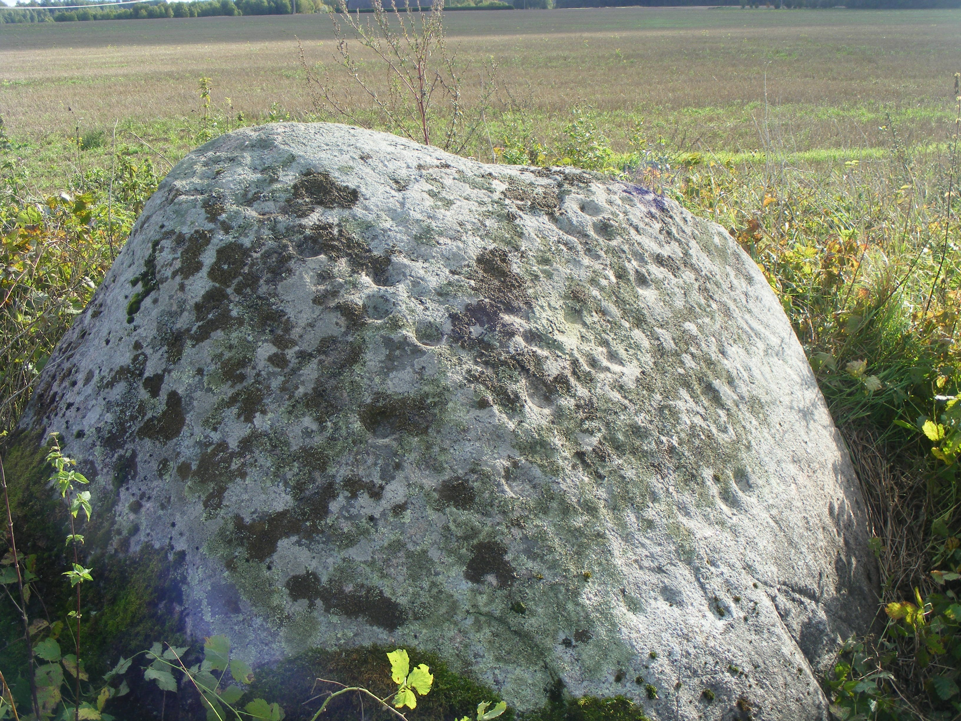 Väikeselohuline kultuskivi Kristuse-eelsest ajastust asub põllul Puhja vallas Vihavu küla lähistel. A-kujuline "signatuur", mille kaldu langev valgus näib esile toovat, on seni kirjeldamata, aga ei tarvitse olla lohkudega seotud.